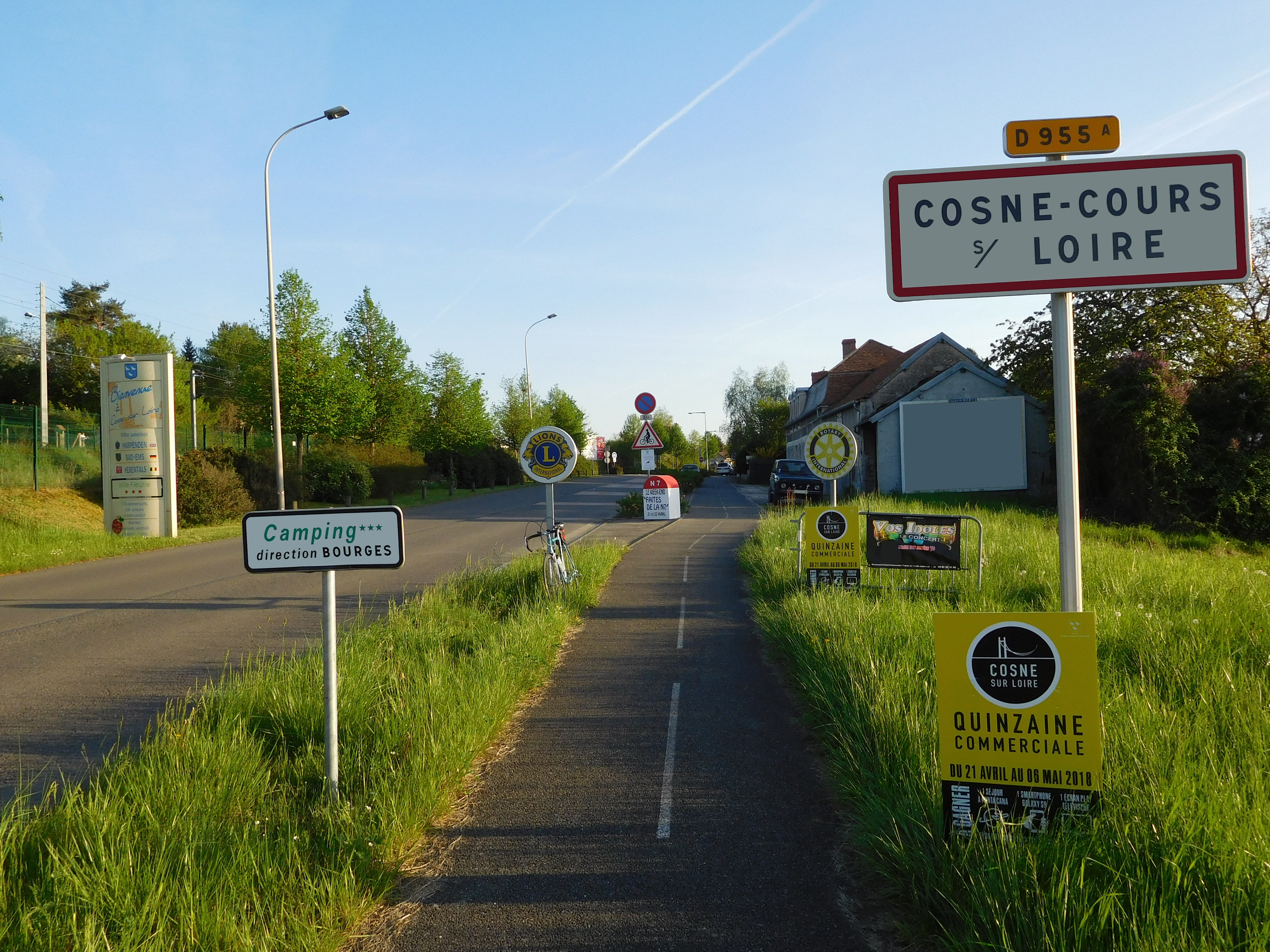 Piste cyclable et panneaux routiers sur la D955A, dont une borne kilométrique géante (provisoire) : « N7 - Le week-end "Faites de la N7" - 21 et 22 avril ». Cosne-Cours-sur-Loire (Nièvre, France).